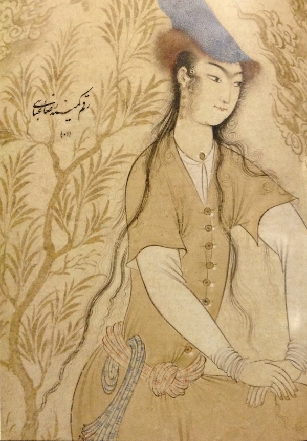 中文（中国大陆）: 波斯史书《成吉思书》（Chingiznama）中记载征伐窝阔台汗国察八儿汗，金帐大汗脱脱汗在泽拉夫尚河畔会见察合台汗国怯别汗的画像